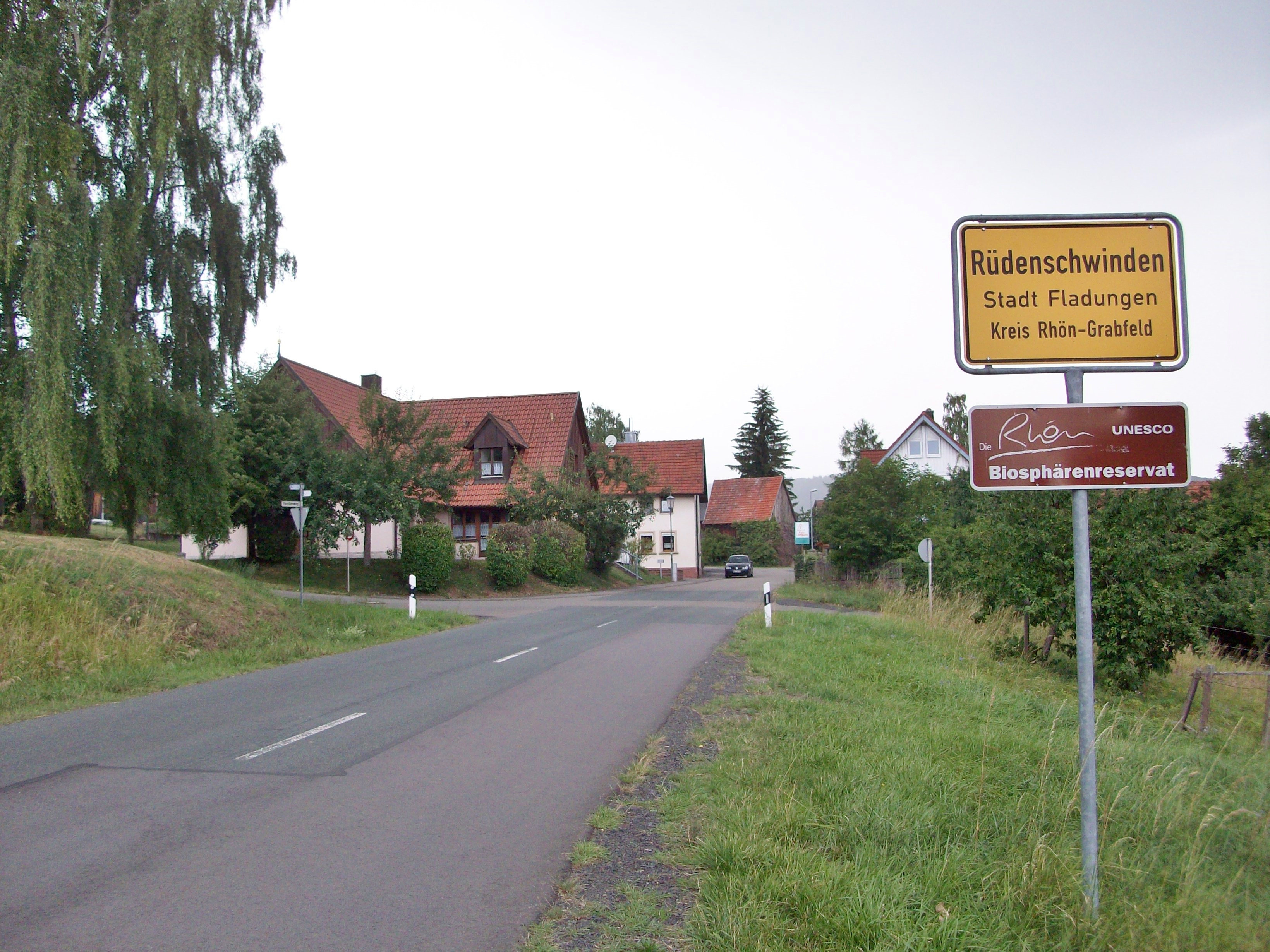 Fladungen in der Rhön: Blick in den Ortsteil Rüdenschwinden